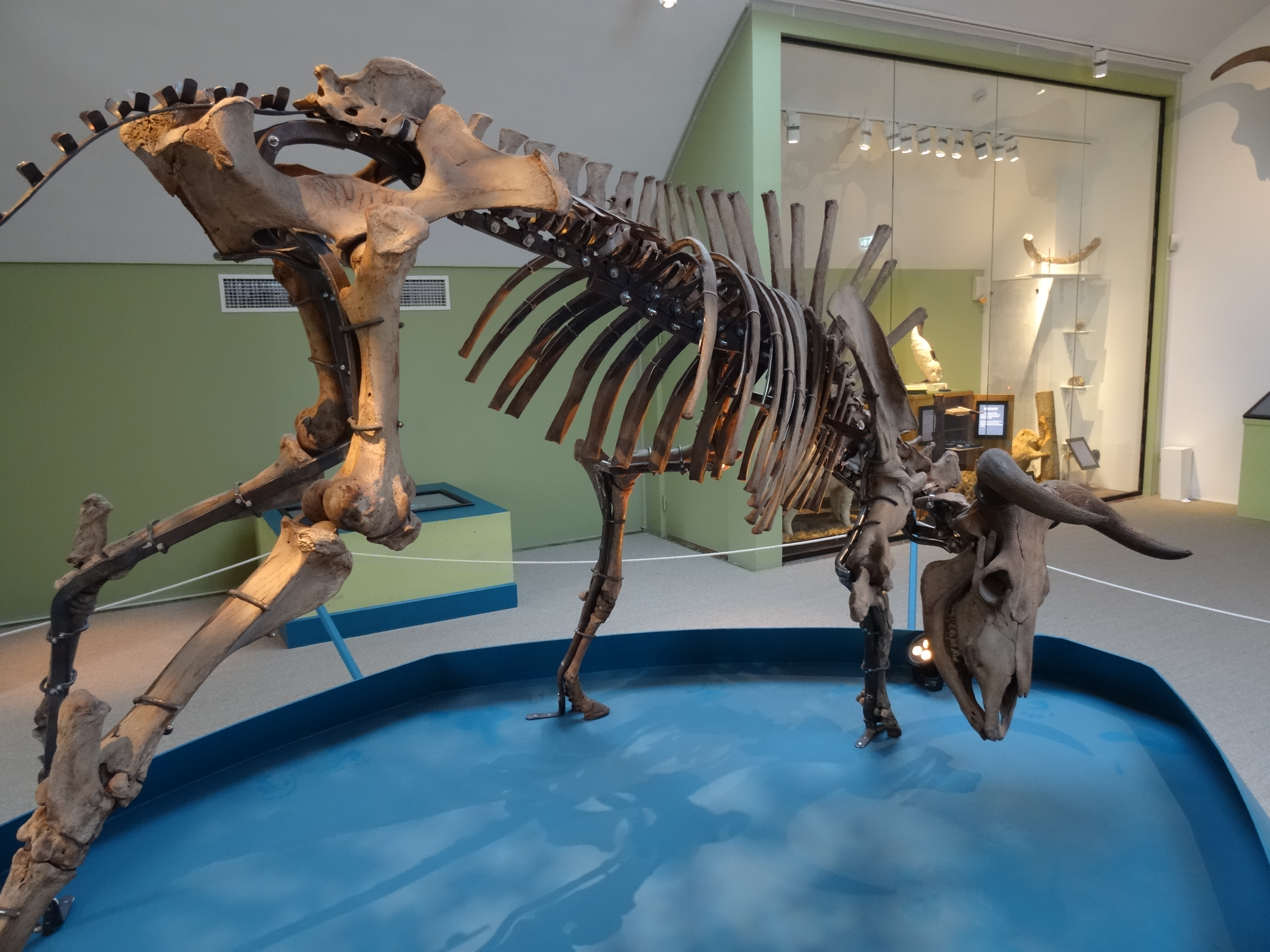 Uroxen från Önnarp utställd på Historiska museet i Lund i oktober 2017.